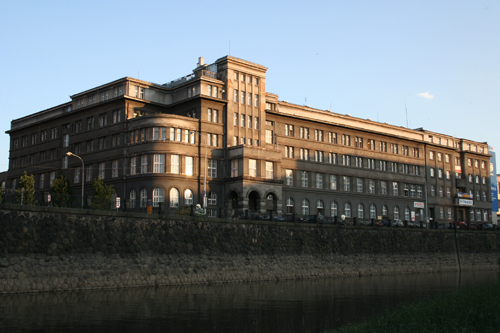 Arch. B. Chvojka - Okresní nemocenská pojištovna (dnes poliklinika), Plzeň. Foto: Eva Haunerová, 2006